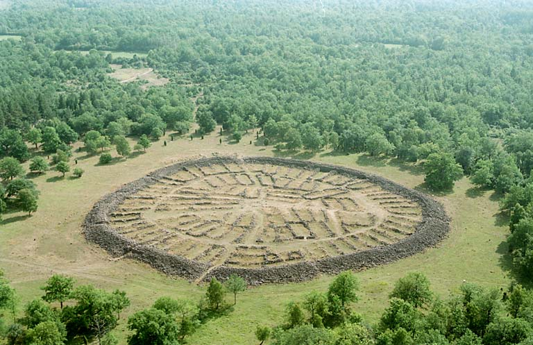 Motiv: Gärdslösa-Runsten Nyckelord: Flygbilder, Riksintressen Kategori: Fornborg . Gärdslösa-Runsten.